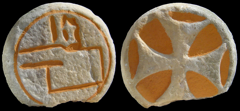 Estèla discoïdau (pèira de cementèri) ; Brassempoi